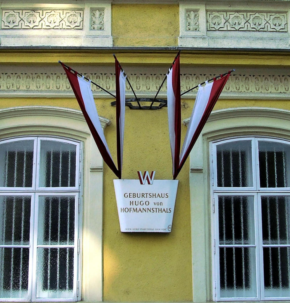 Geburtshaus von Hugo von Hofmannsthal im 3. Bezirk in Wien, Salesianergasse 12.